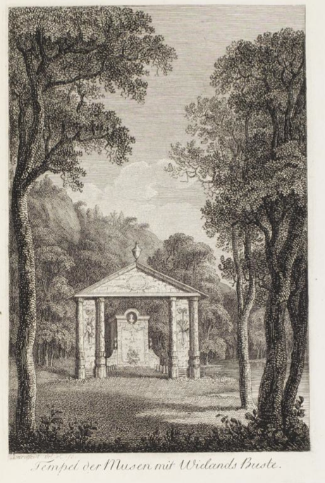 Seifersdorfer Tal in Sachsen - Tempel der Musen mit Wielands Büste auf der Musenwiese, Kupferstich von J. A. Darnstedt, in: Wilhelm Gottlieb Becker: Das Seifersdorfer Thal. Leipzig : Voß und Leo, 1792